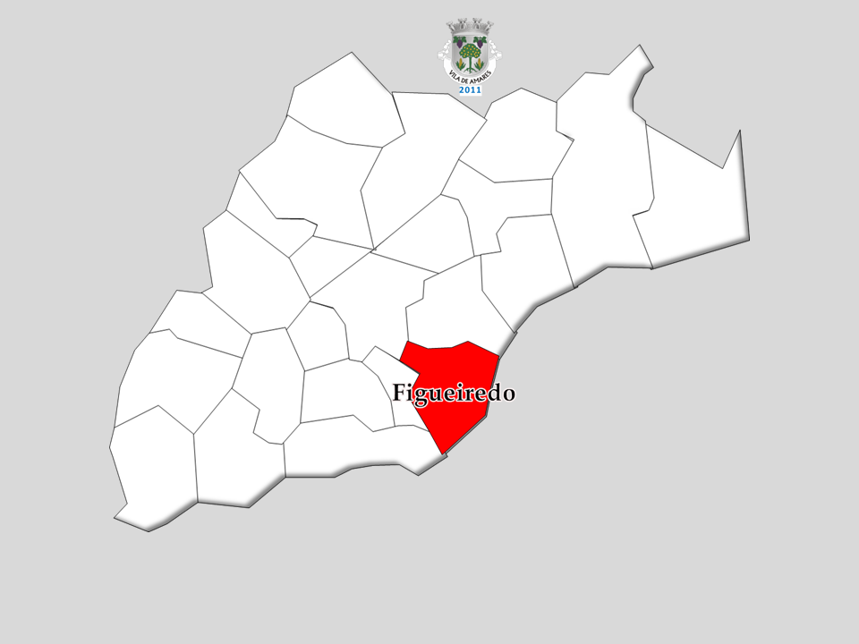 Censo 2011